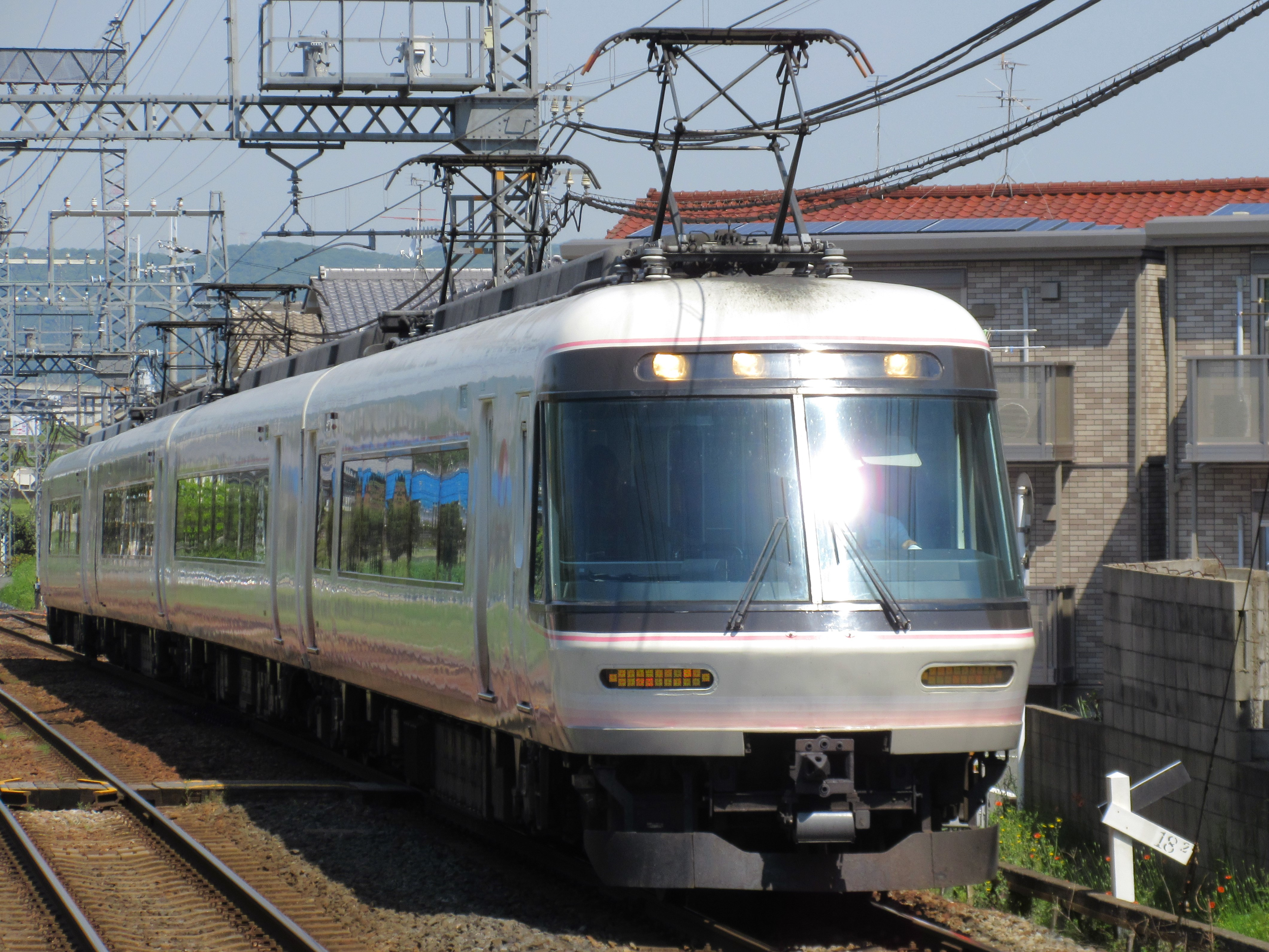 近鉄26101 (当麻寺駅にて)